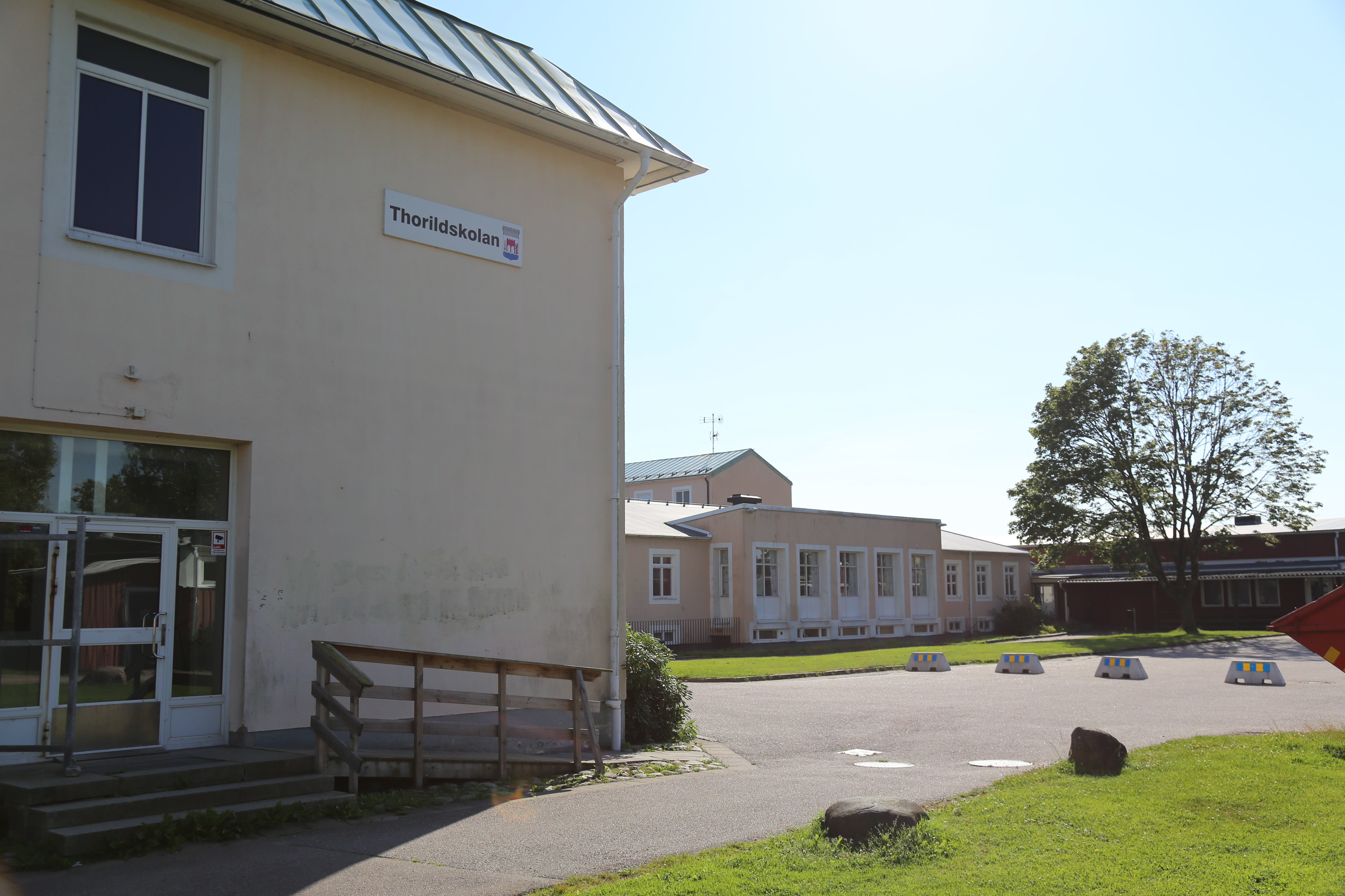 Thorildskolan i Kungälv.